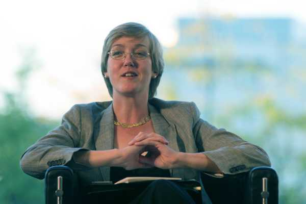 Constanze Stelzenmüller